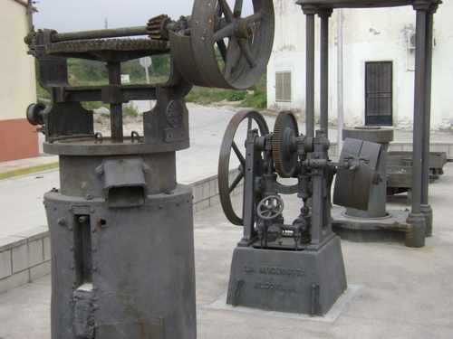 Exposicion permanente de herramientas de almazara